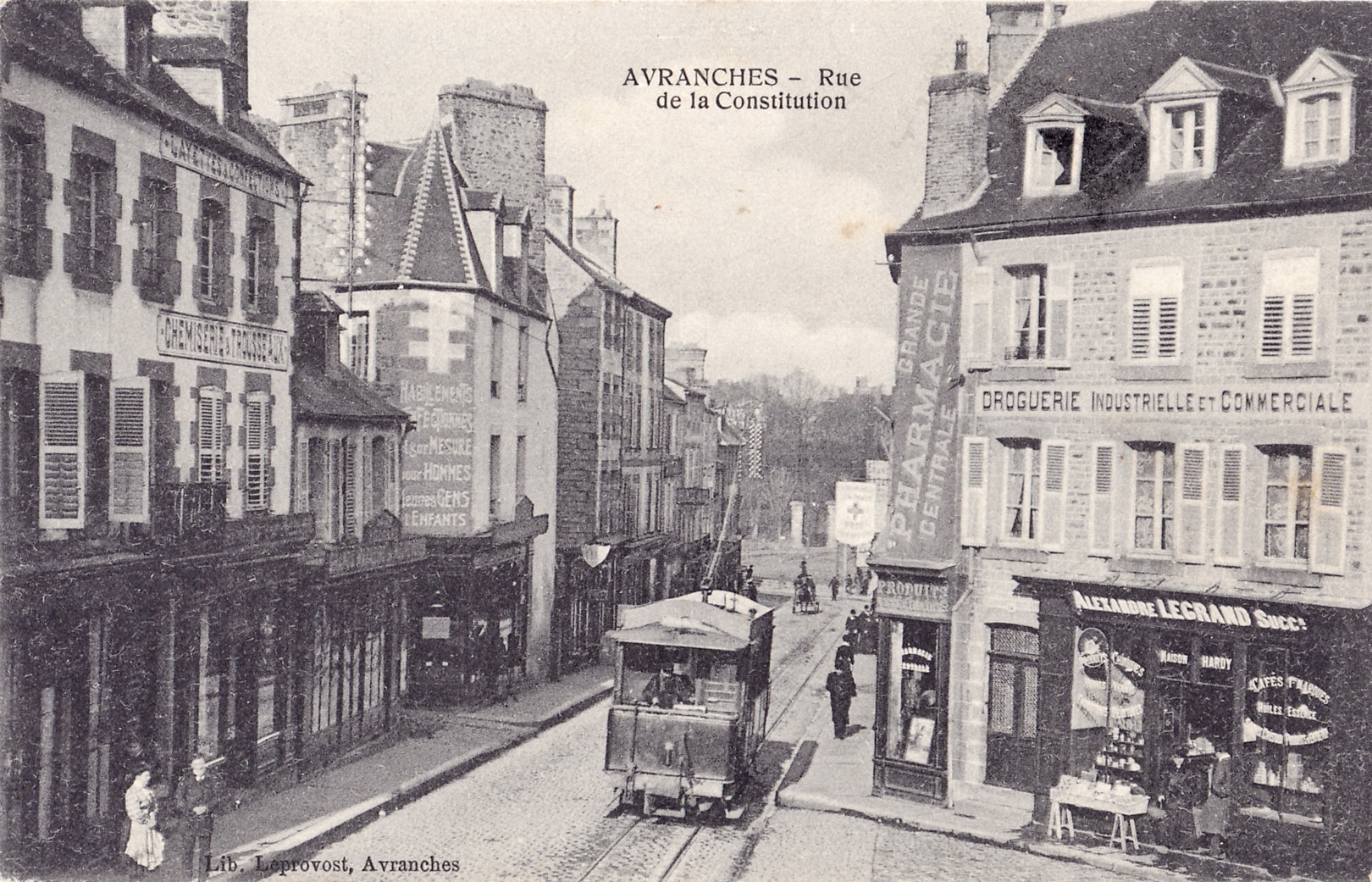 Carte postale ancienne éditée par Librairie Leprovost à Avranches : AVRANCHES - Rue de la Constitution